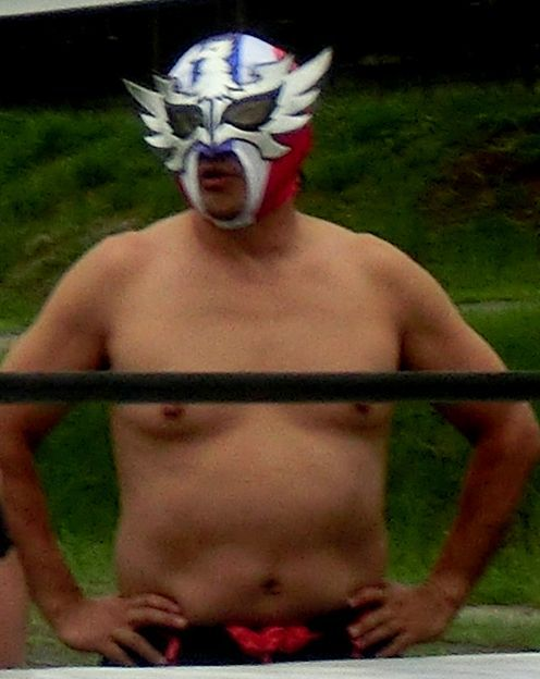 Muay Thai King